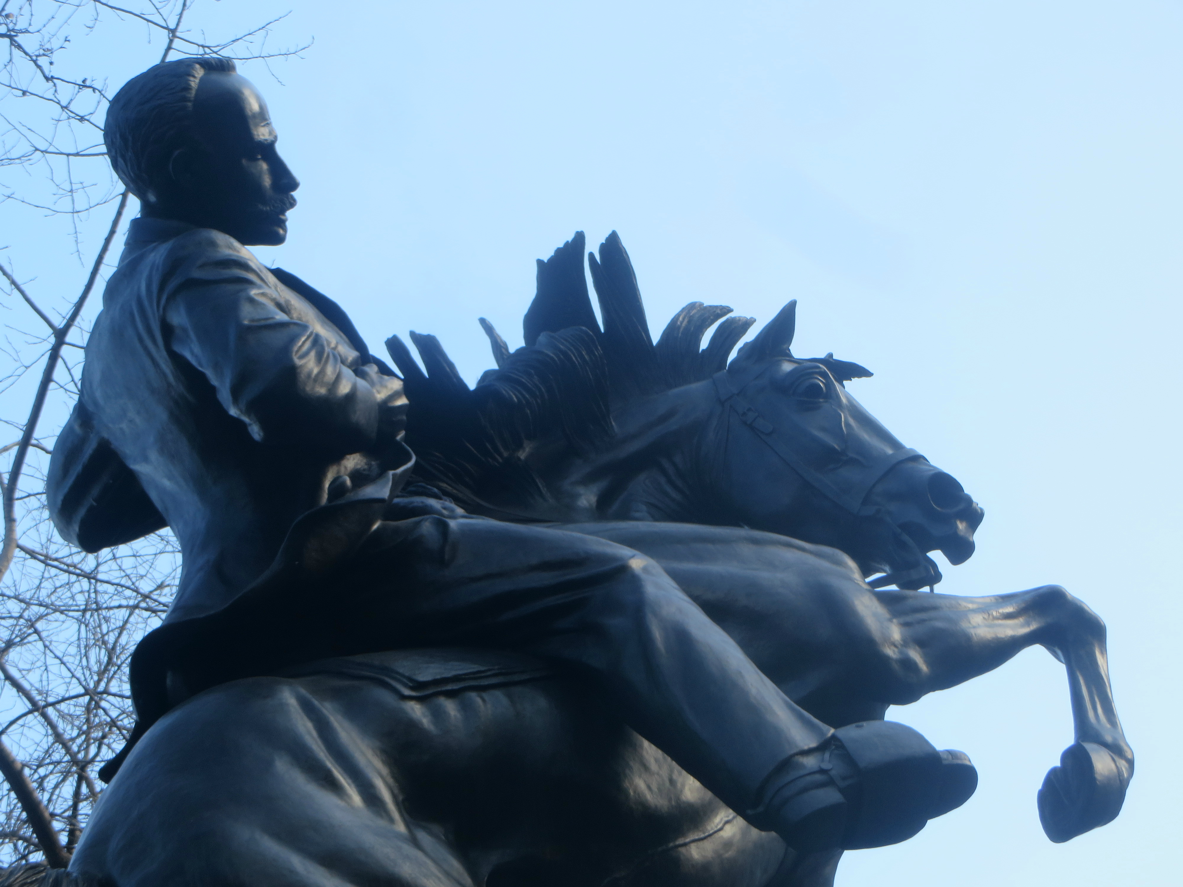 Jose Marti